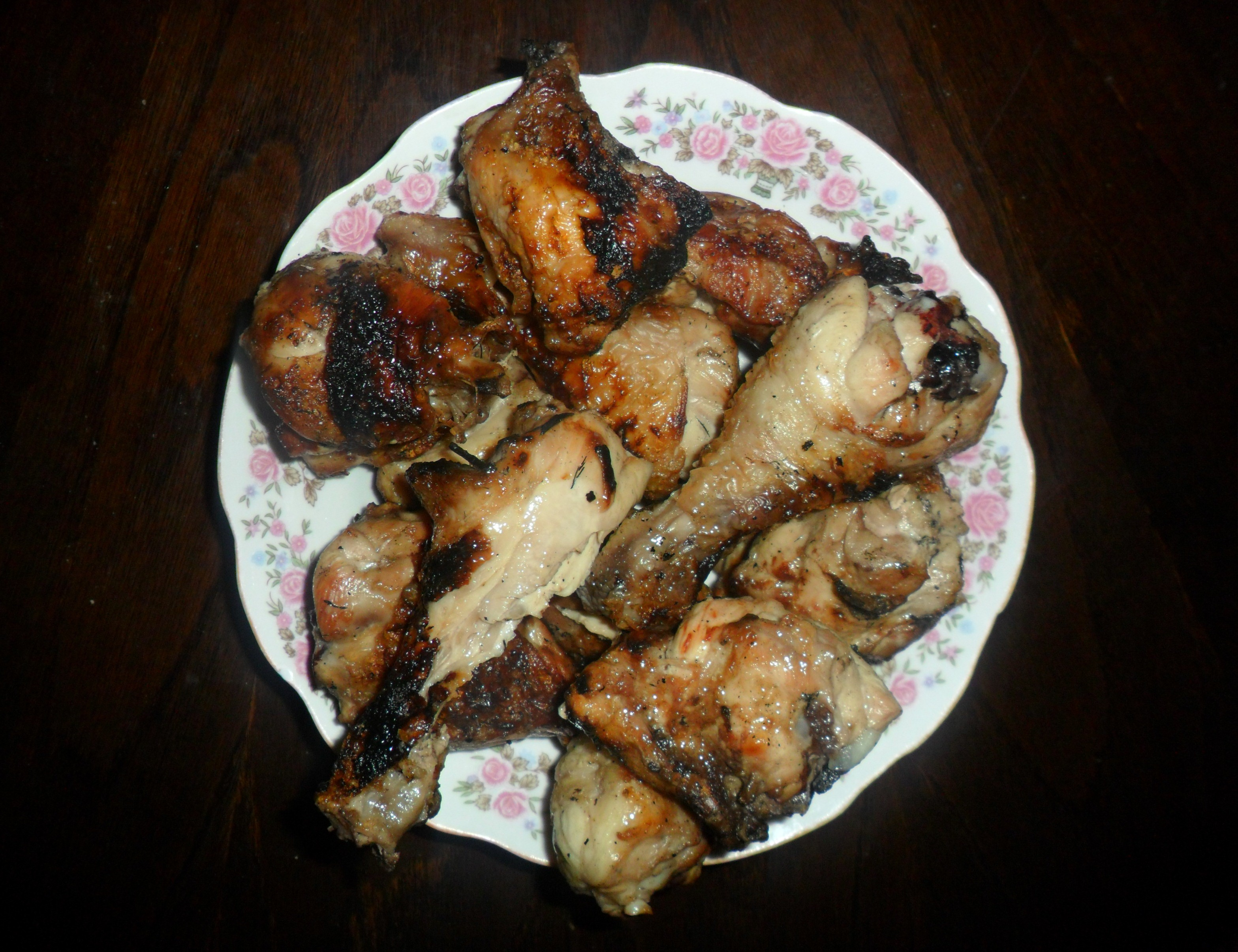 Toyuq kababı